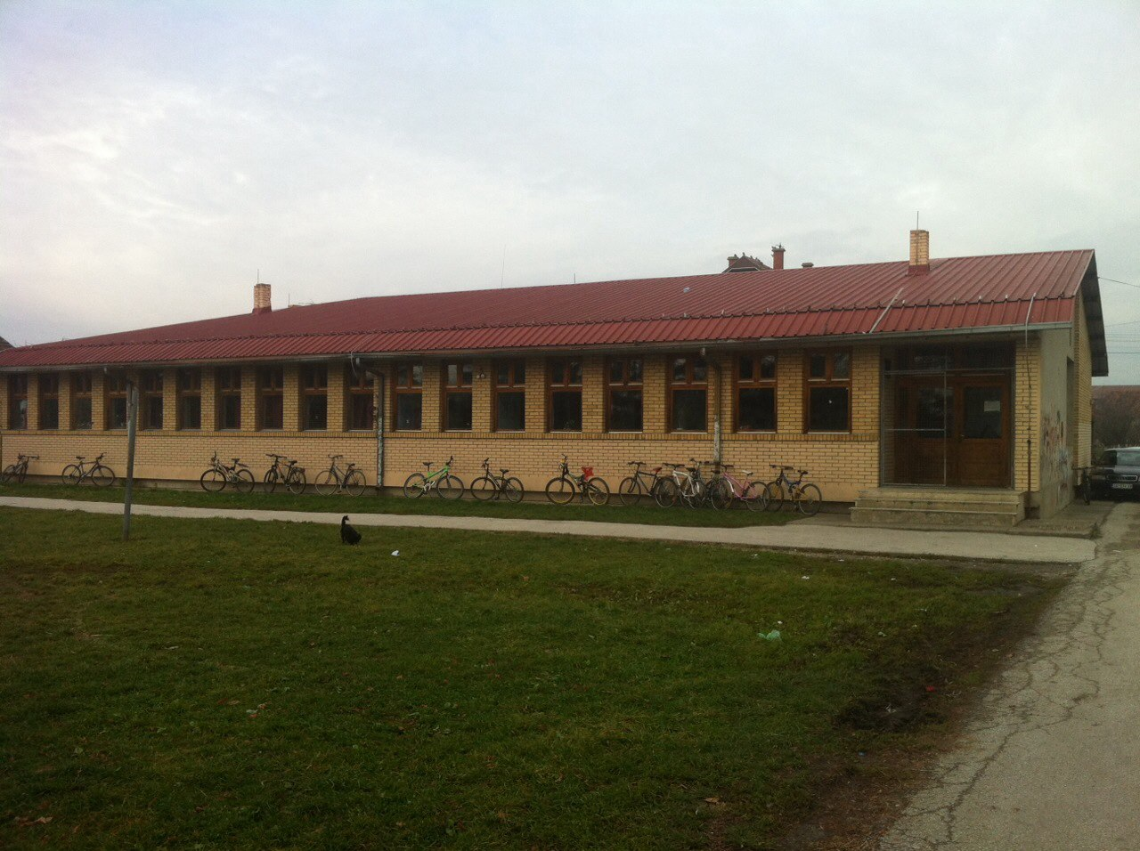 Srpski (latinica): OŠ Ljubiša Urošević Ribare, slikano u okviru projekta Naša škola Viki škola 2015.